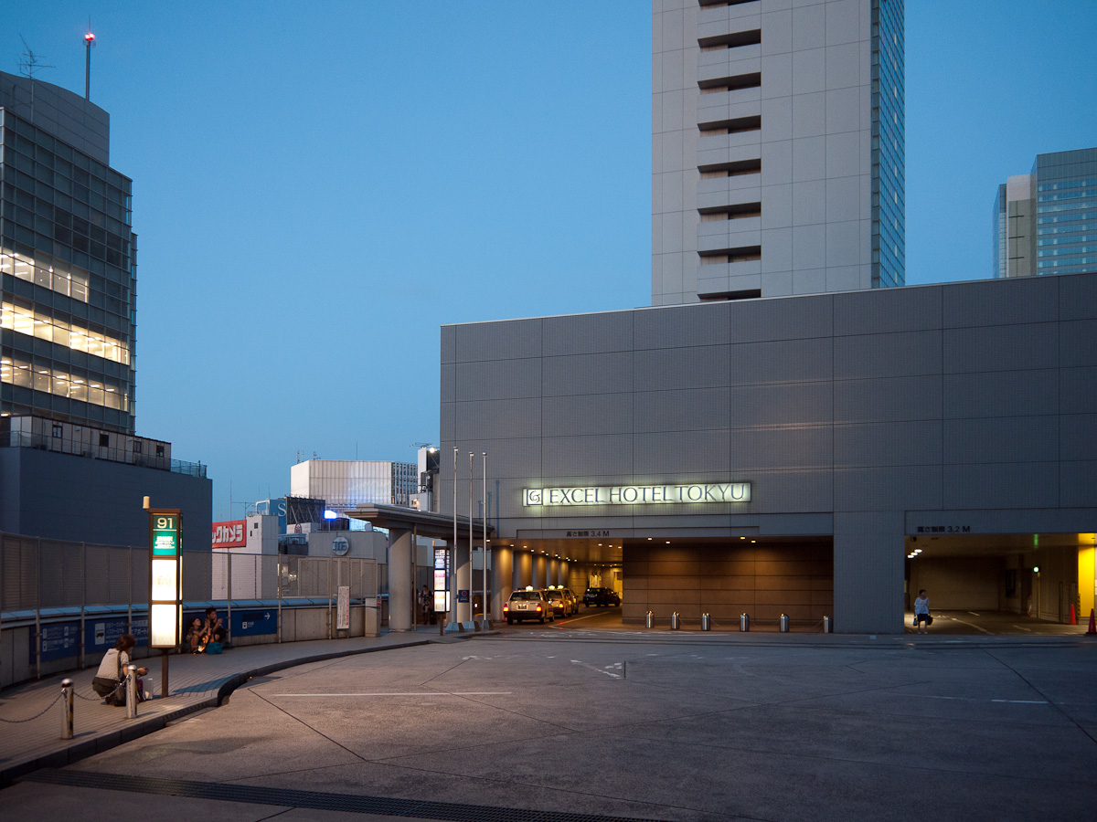 渋谷マークシティ5階にあるバスターミナルとエクセル東急ホテル車寄せ。